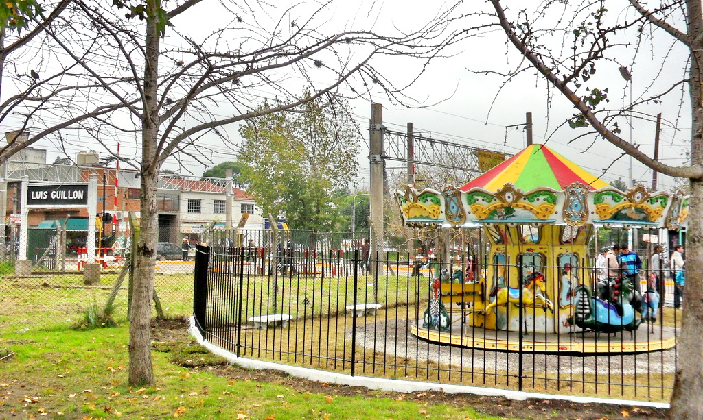 Una calecita histórica de la ciudad.